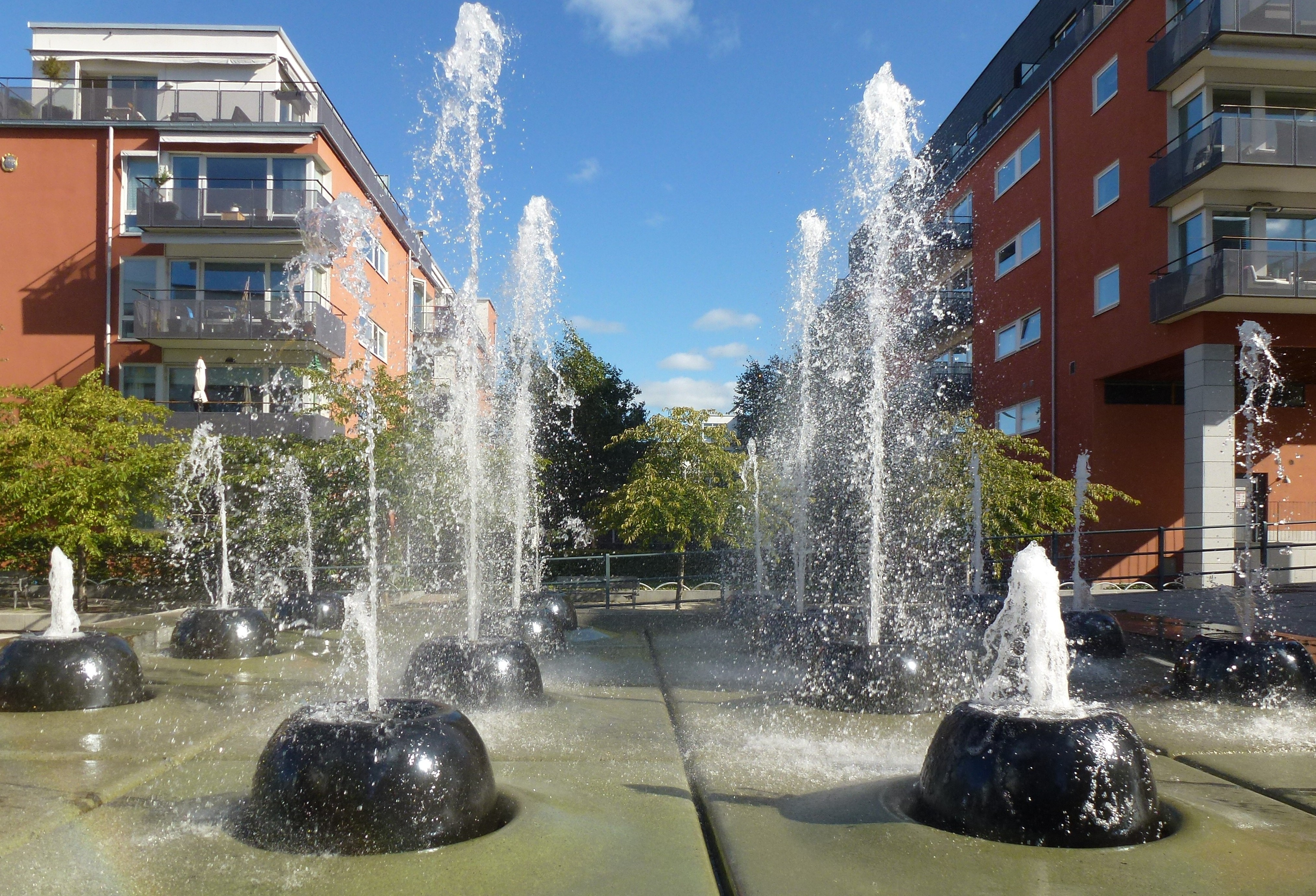 Sjöstadsparterren, fontän "Fält" av Thomas Nordström, Södra Hammarbyhamnen, Stockholm, Sweden